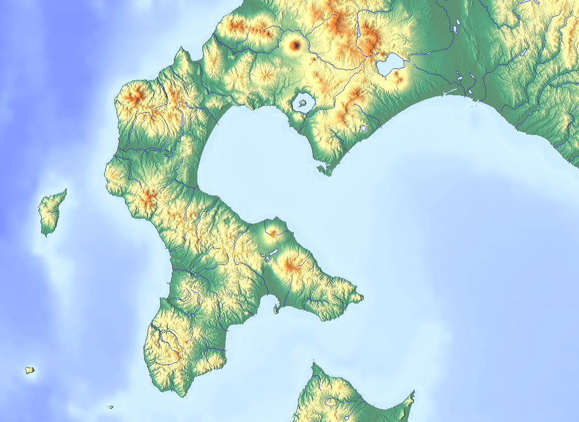 日本国北海道南部の地形図